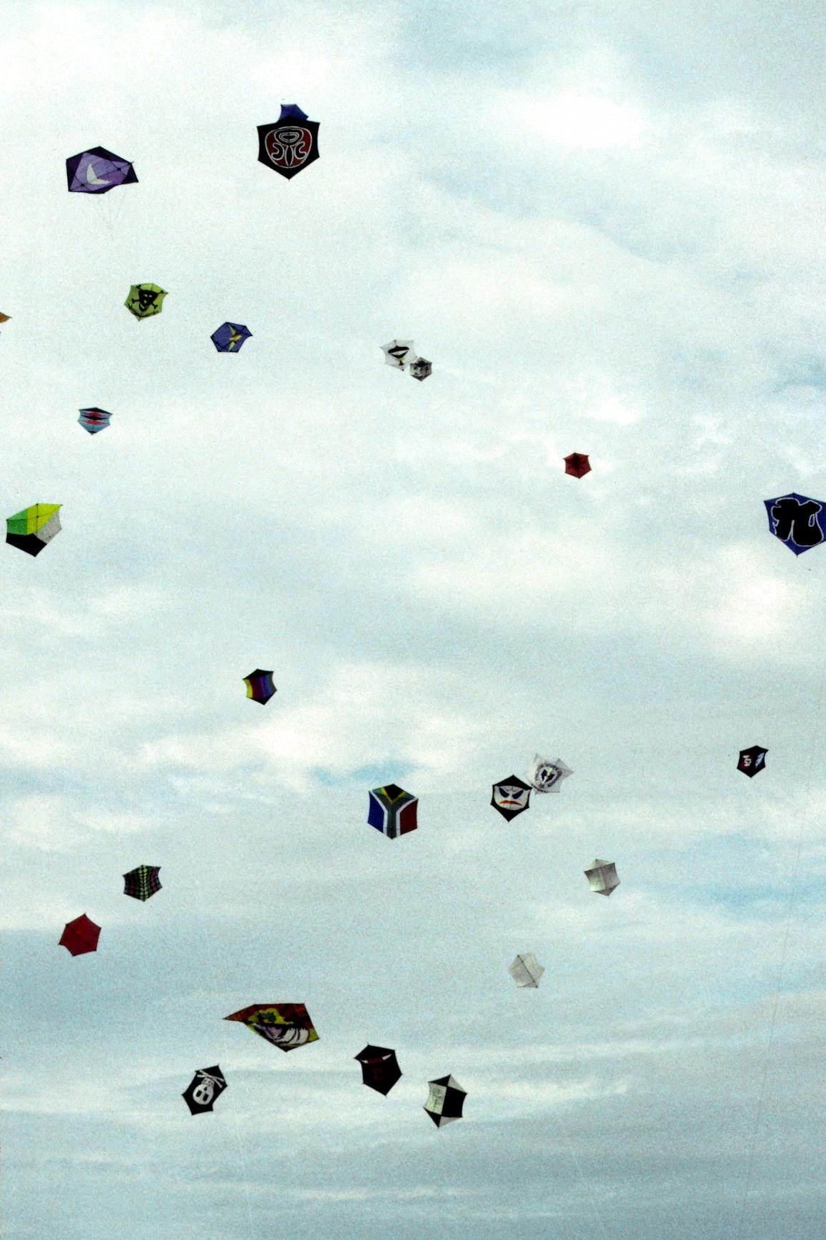 Combat de rokkakus à Dieppe.